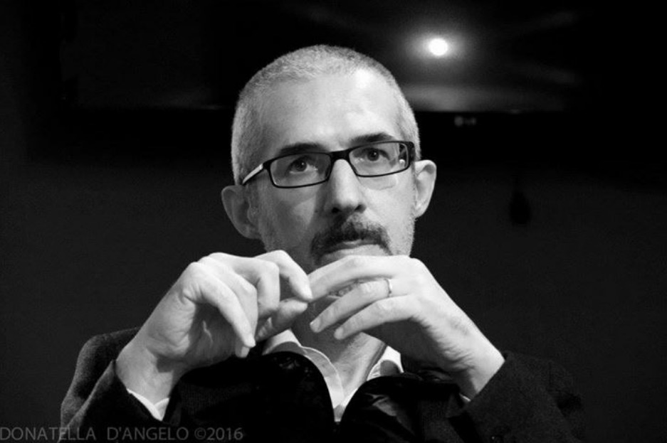 Poetry